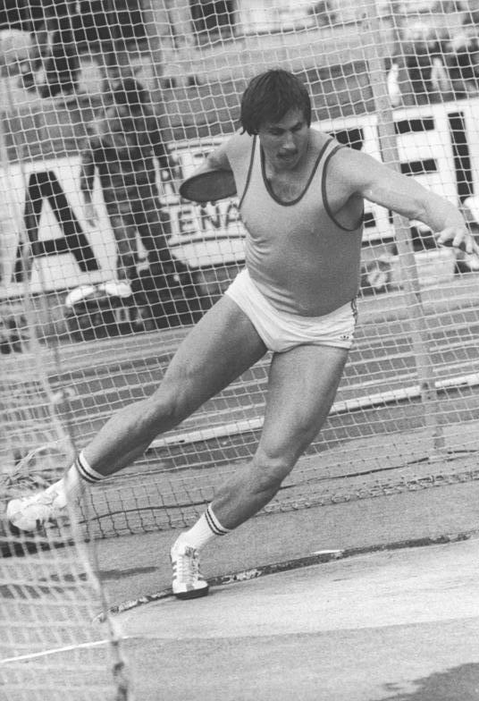 Jürgen Schult ADN-ZB Thieme 6.6.86 Bez. Gera: Weltrekord- Mit 74,08 Metern stellte der 26jährige Jürgen Schult vom SC Traktor Schwerin bei der EM-Qualifikation der DDR-Leichtathleten in Neubrandenburg einen neuen Weltrekord im Diskuswerfen auf. Bei kühlen Temperaturen und starkem Wind verbesserte er die alte Bestmarke um 2,22 Meter. (Foto von der EM-Qualifikation am 31.5.86 in Jena.)